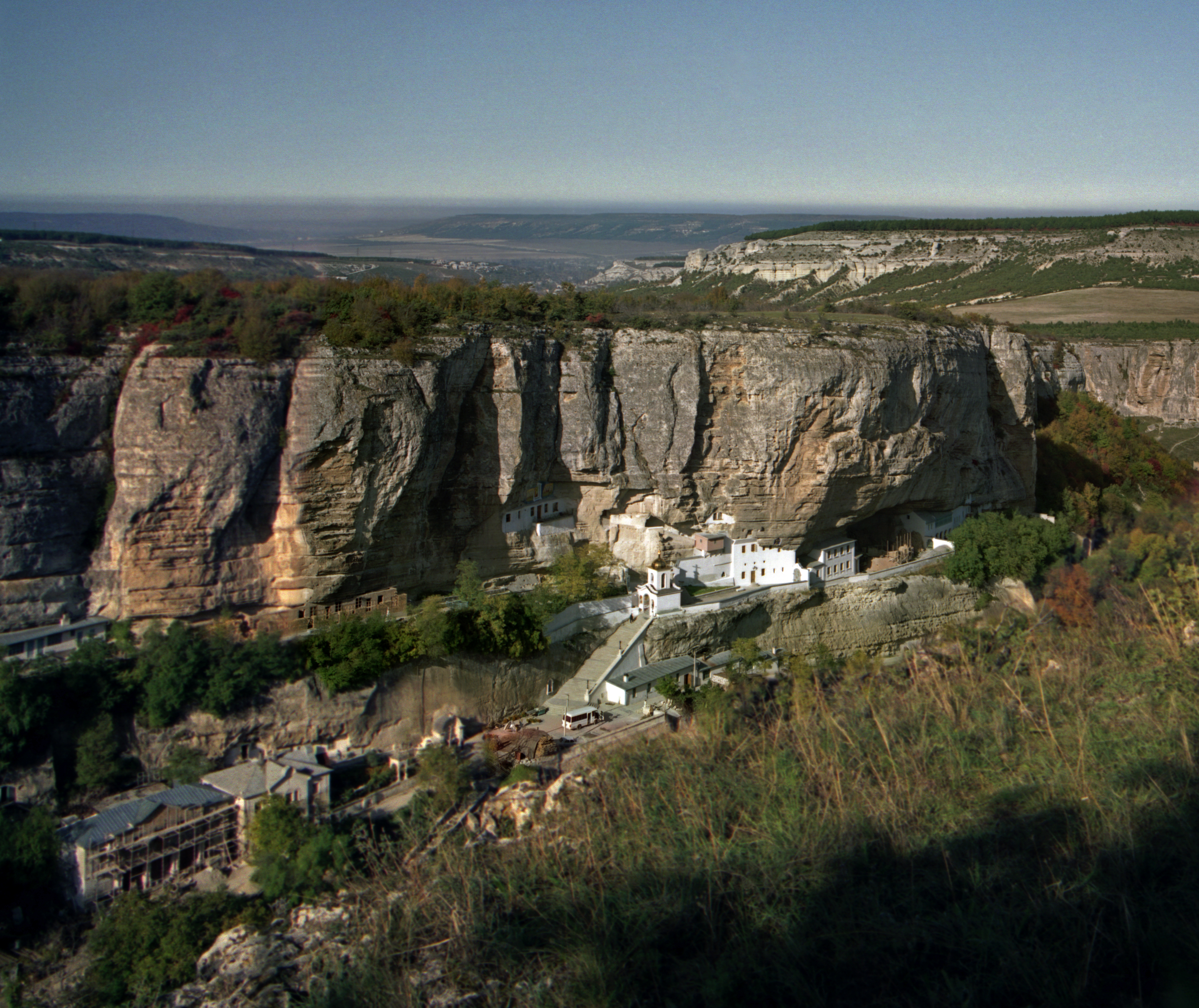 Комплекс Успенського печерного монастиря, Бахчисарай, західний схил балки Майрум-дере